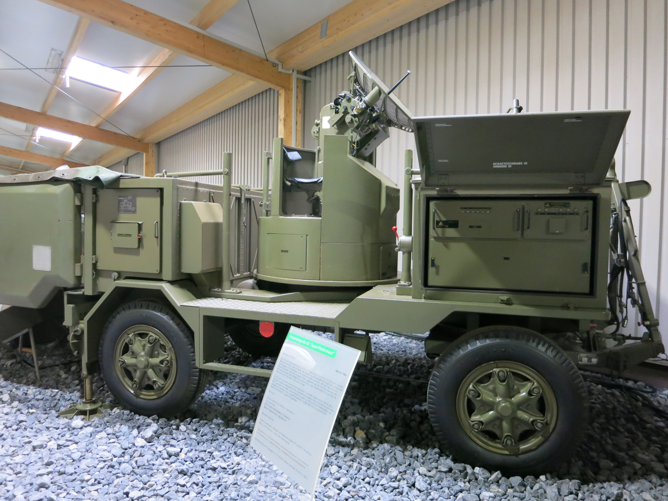 Flieger-Flab-Museum, Dübendorf ZH, Schweiz